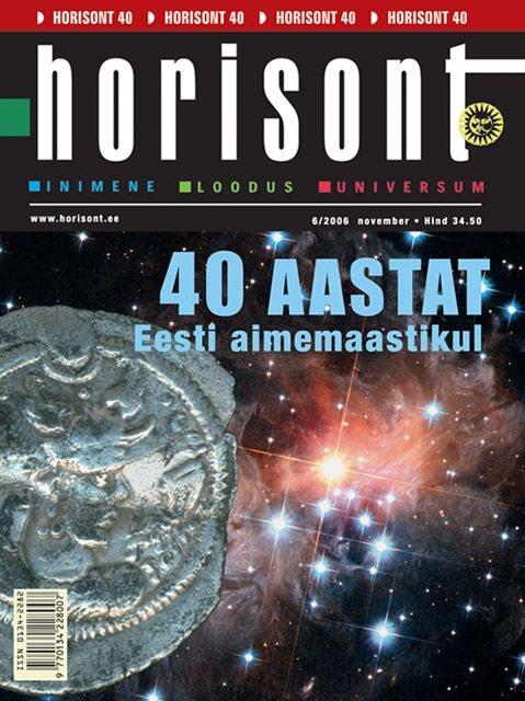 Horisondi juubelinumbri kaas.